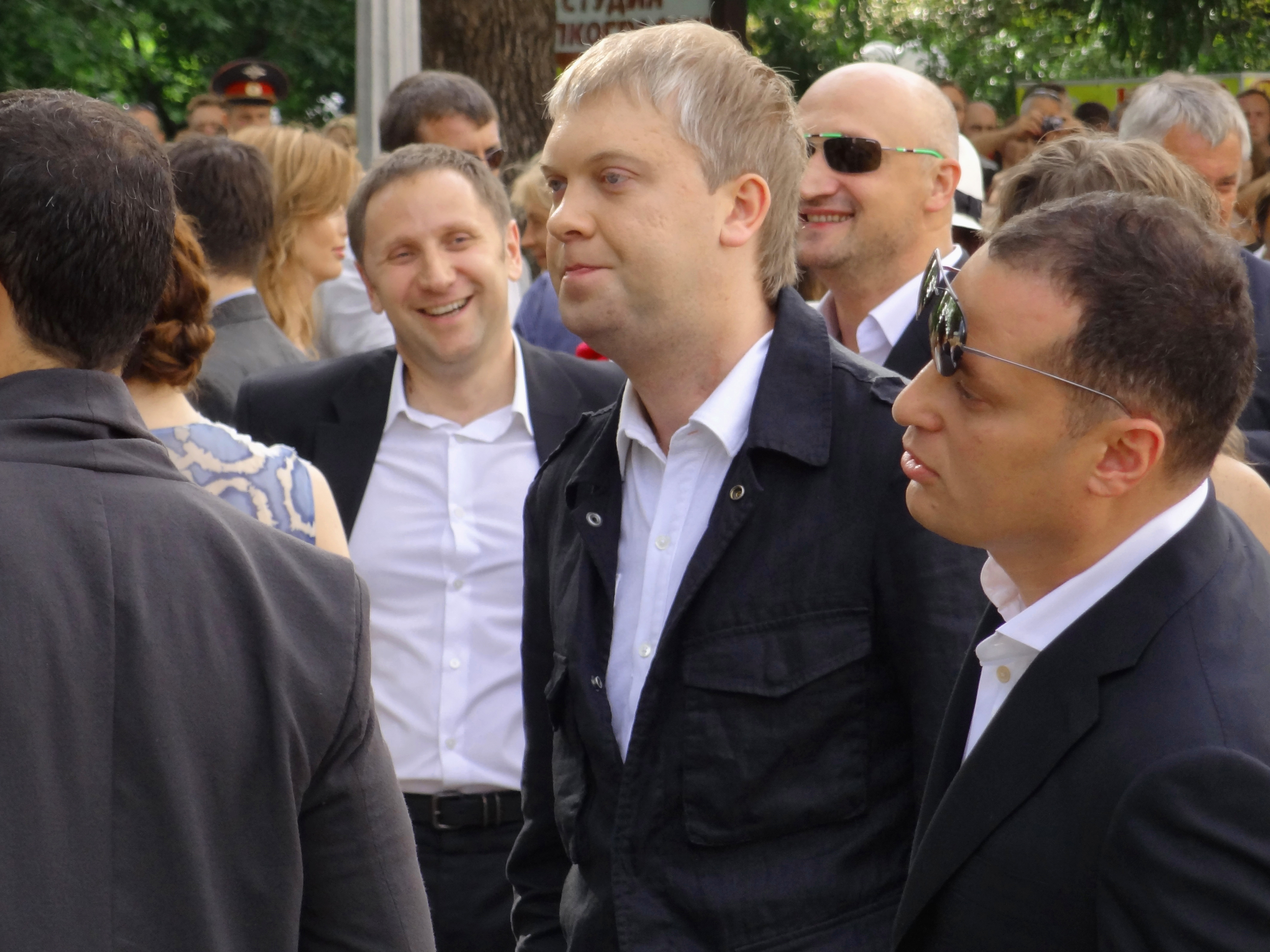 Серге́й Ю́рьевич Светлако́в (род. 12 декабря 1977, Свердловск, РСФСР, СССР) в Сочи, 2011. Кинотавр.